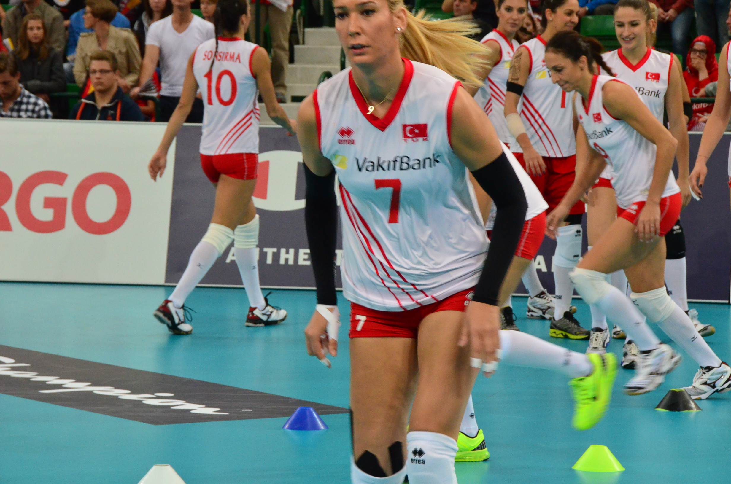 Volleyball-Europameisterschaft der Frauen 2013-Spielort Halle (Westf) Gerry-Weber-Stadion - Spiel 8. September 2013 (Deutschland-Türkei)